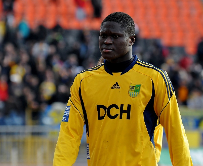 Папа Гуйе